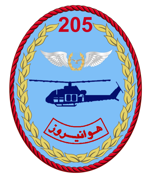 خلبان هلیکوپتر بل-٢٠٥ هوانیروز ارتش